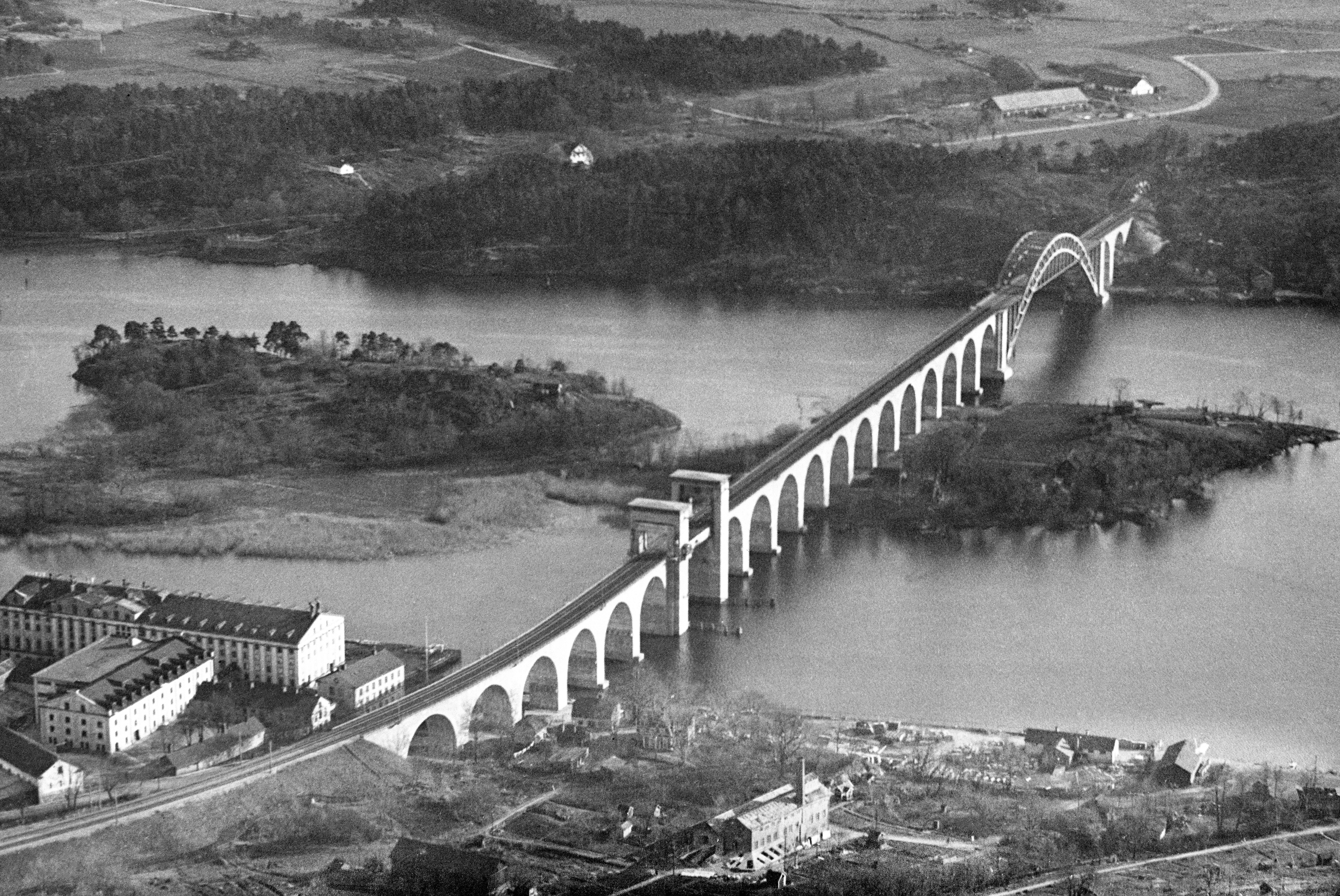 Flygbild söderut från Södermalm över Årstaviken, Årstaholmar och Årstabron mot Årsta. I förgrunden byggnader som tillhör Tanto Sockerbruk. Mitt i bildens övre del syns Årsta gårds huvudbyggnad och uppe till höger gårdens stallbyggnad och lada. I fonden delar av blivande Årstafältet.